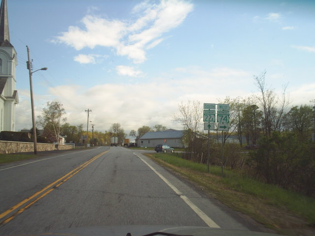 Vermont State Route 74